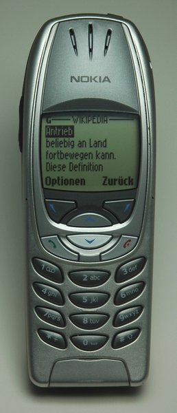 Nokia 6310i